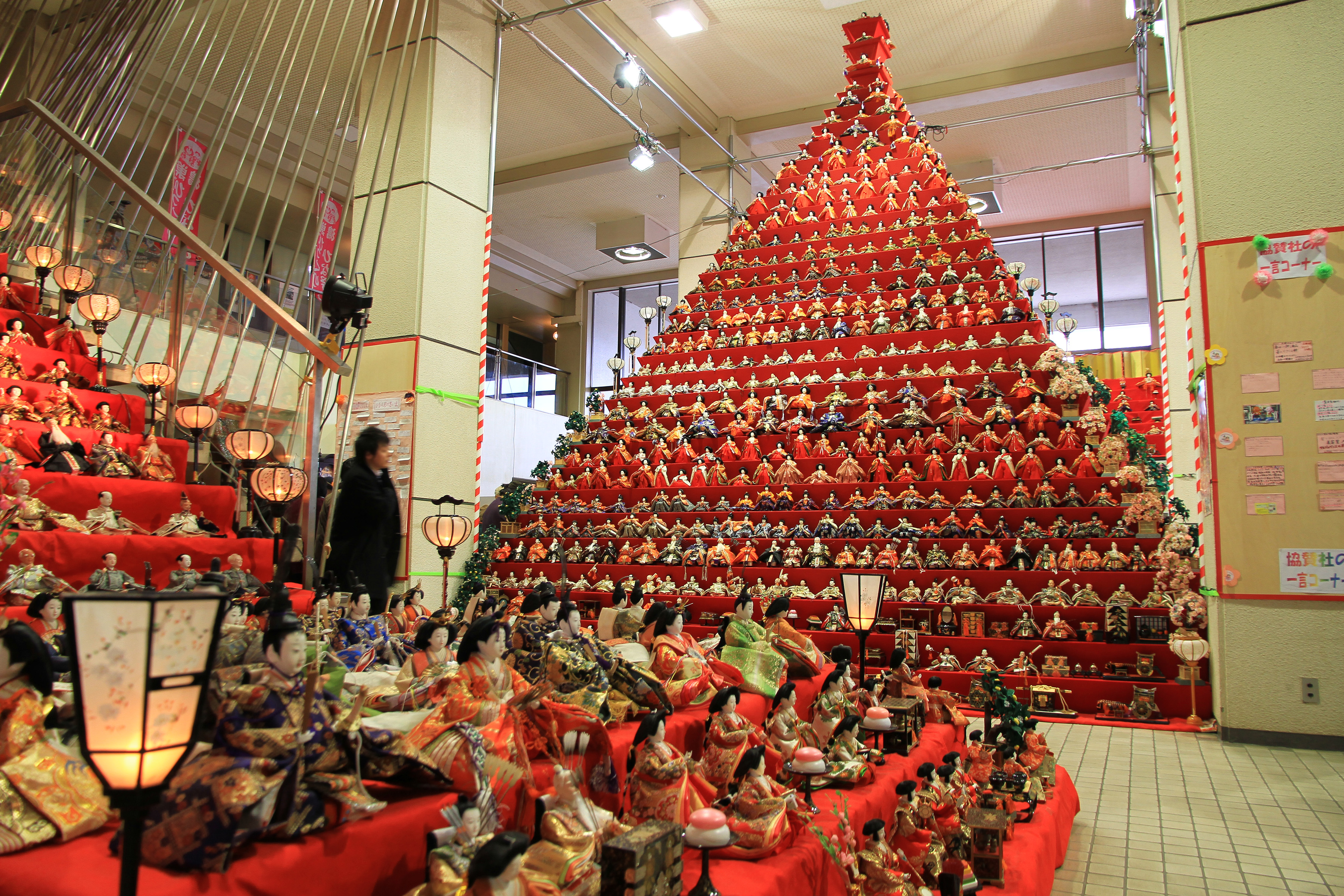 日本一のピラミッドひな壇（鴻巣びっくりひな祭り2011にて）（埼玉県鴻巣市）